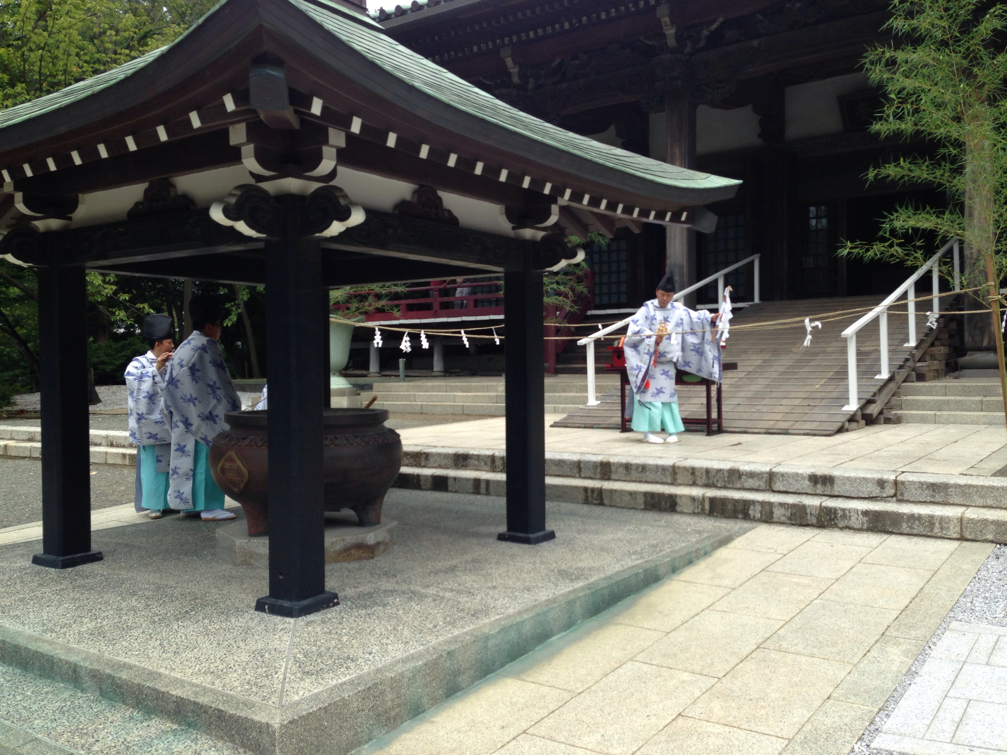 神奈川県藤沢市大鋸の諏訪神社例祭。 清浄光寺（遊行寺）にて8月25日の正午前（午前中）に行われる神事。